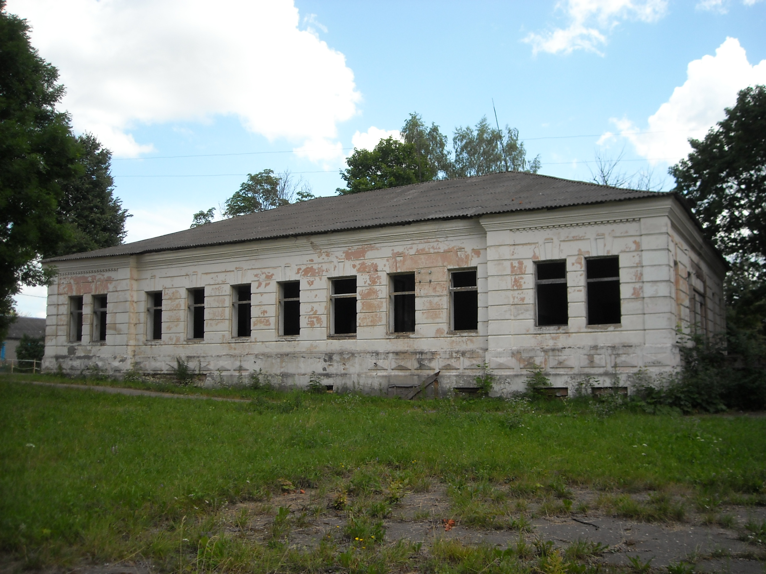 Беларуская (тарашкевіца): Комплекс былой сядзібы — сядзібны дом, ляпны дэкор на столі і сьценах, рэшткі гаспадарчых пабудоў і сьпіртзаводу. в. Расна This is a photo of Belarusian heritage monument. Reference number: 512Г000456 ( WLM)